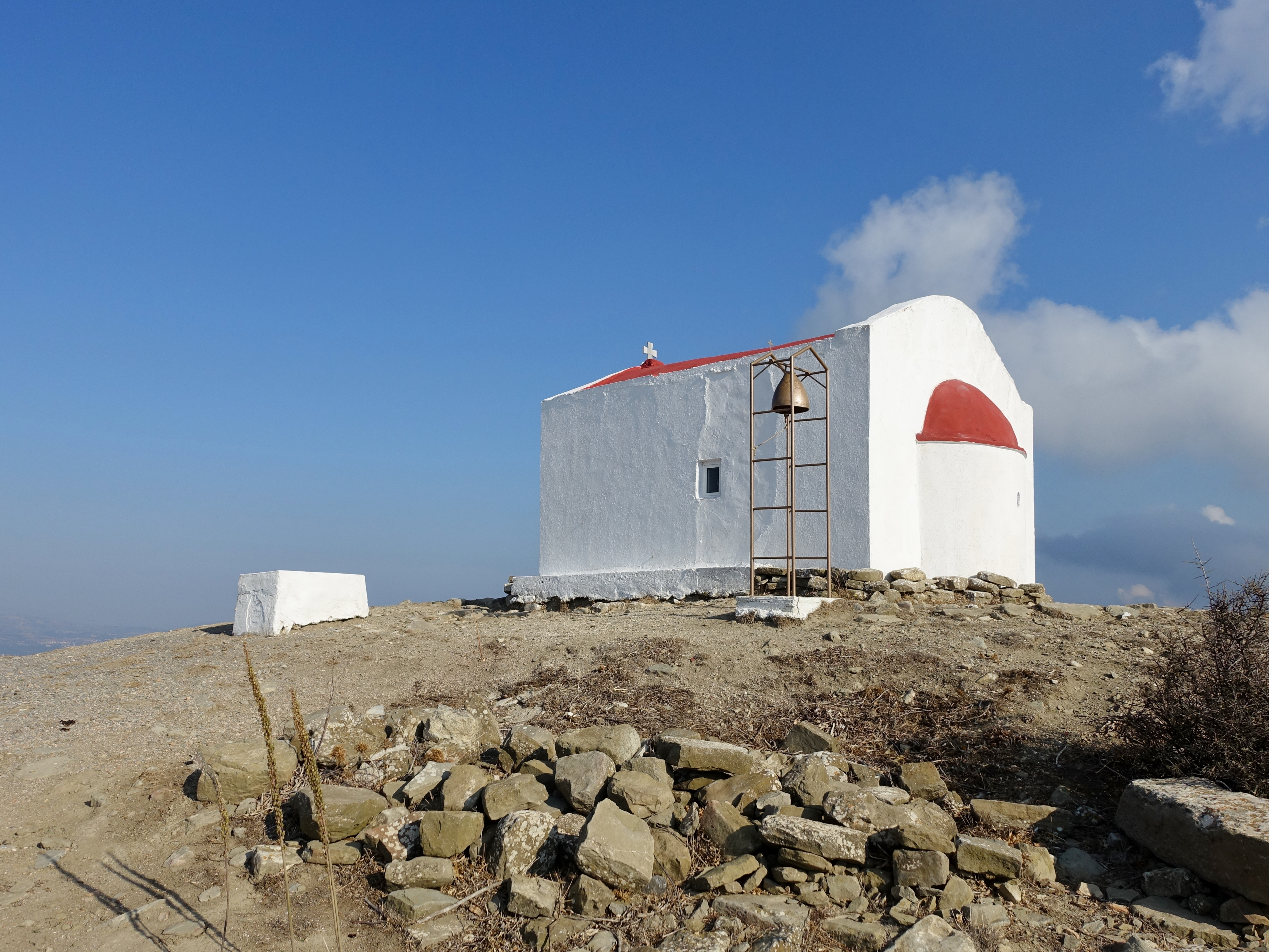 Blick auf die Kapelle Profitis Ilias (Προφήτης Ηλίας) bei Afrati (Αφράτι), Gemeinde Viannos, Regionalbezirk Iraklio, Kreta, Griechenland